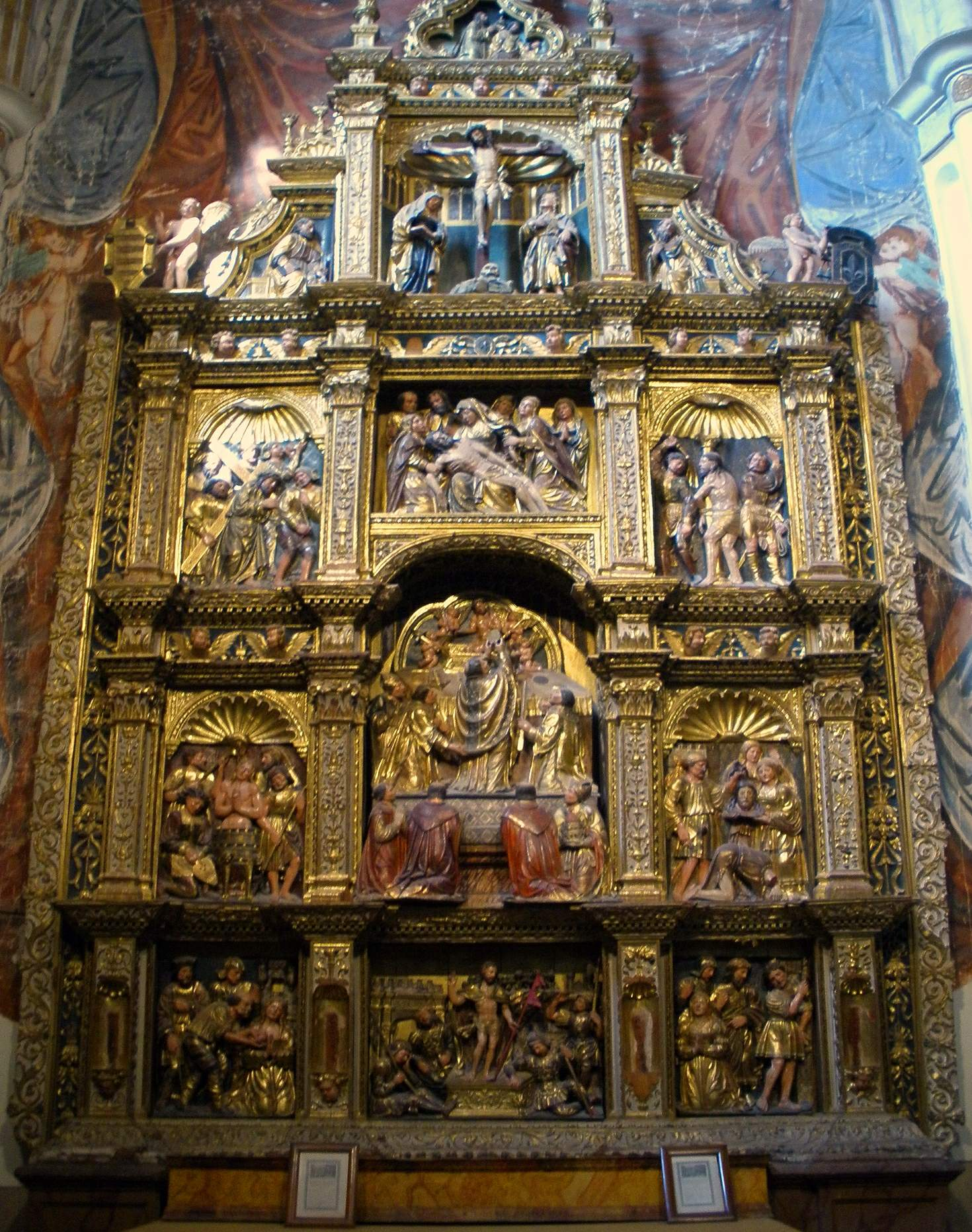 Capilla de San Gregorio, Catedral de Palencia